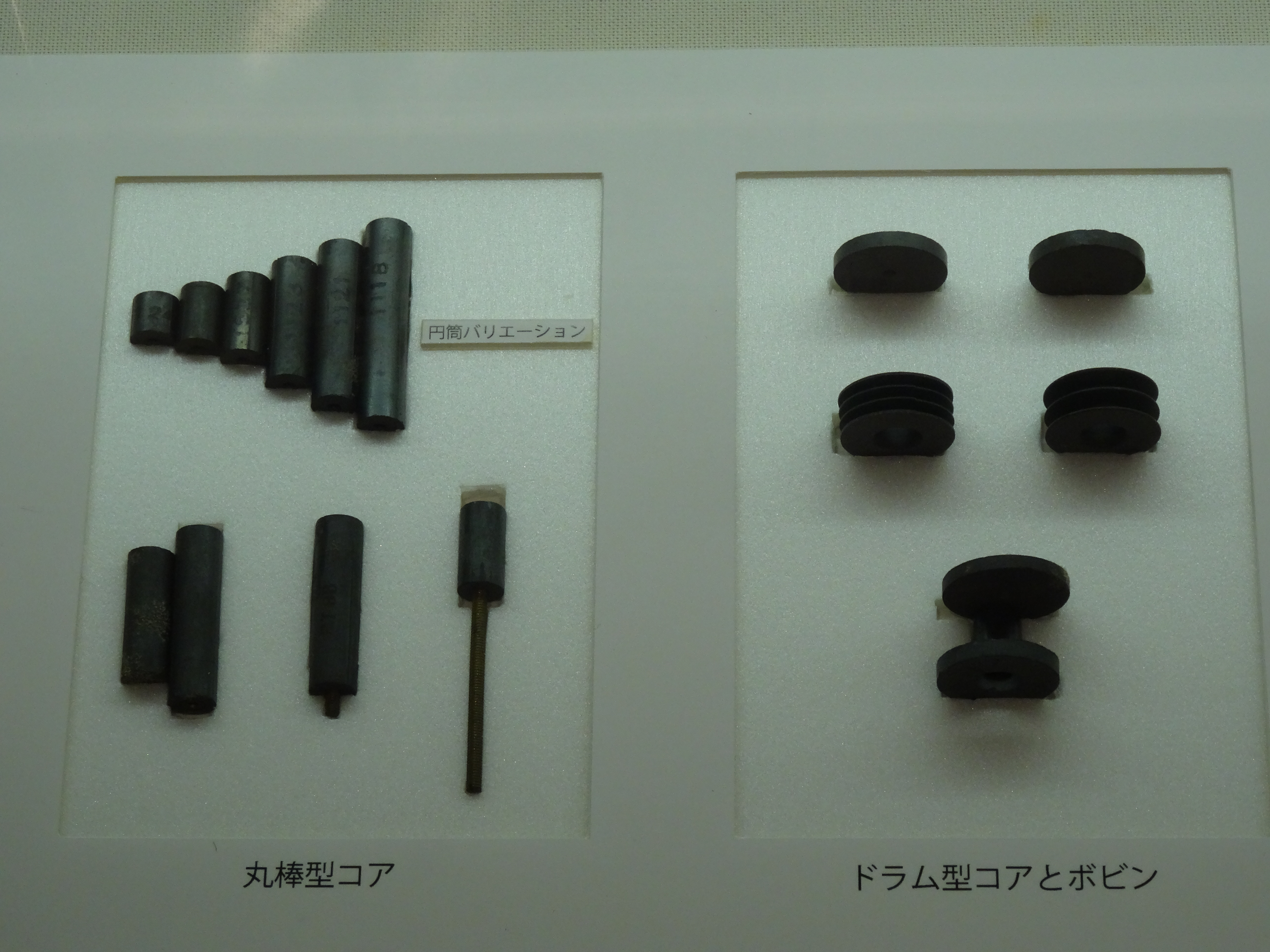 武井武が保管していたとされる初期のja:フェライトサンプル。東京工業大学博物館所蔵。